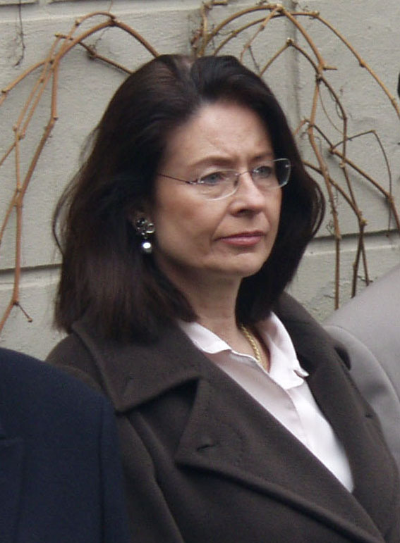 Miroslava Němcová, místopředsedkyně Poslanecké sněmovny Parlamentu České republiky, při odhalení pamětní desky na festivalu Mene Tekel.